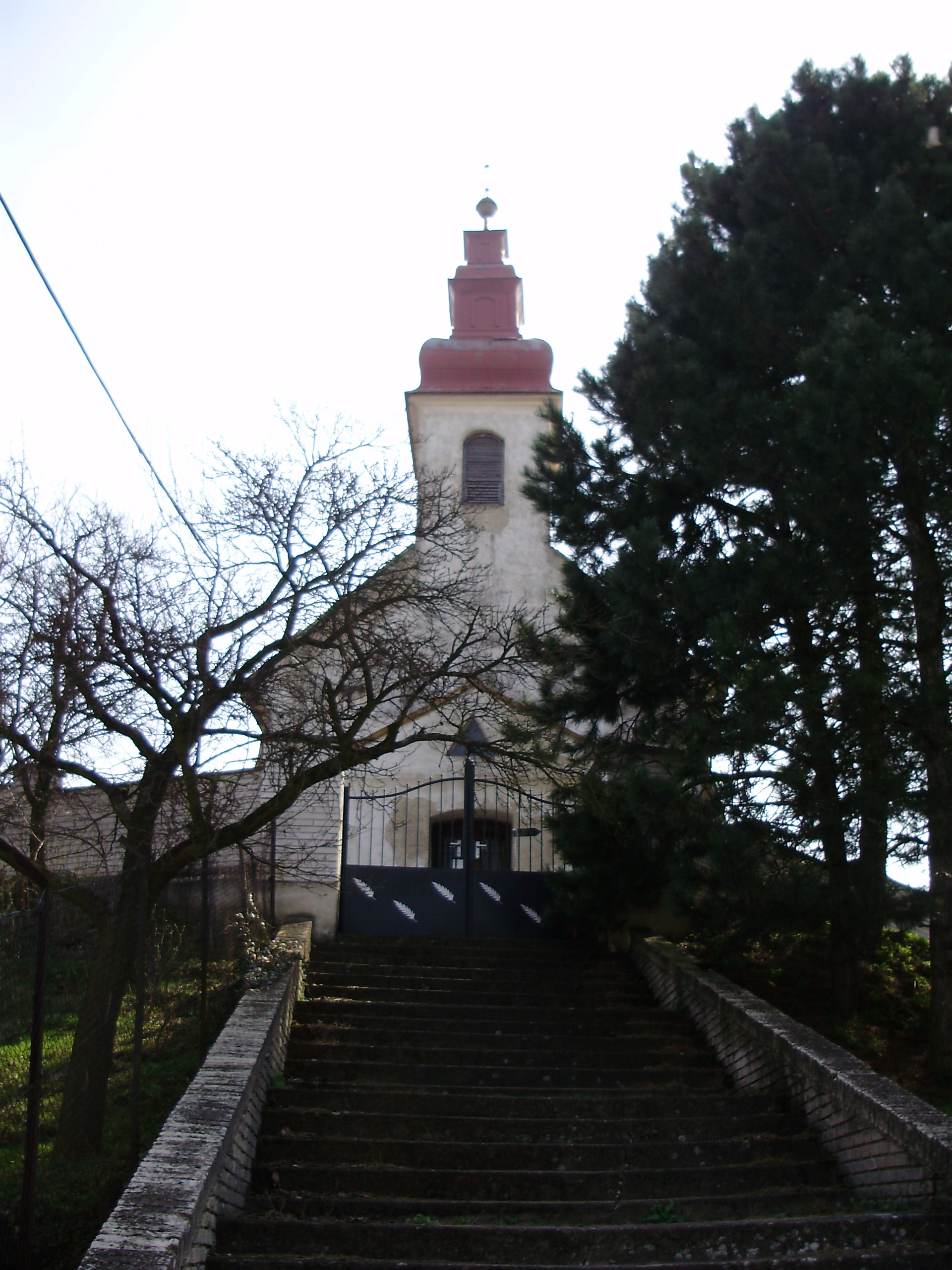 Filiální kostel „Všech svatých“